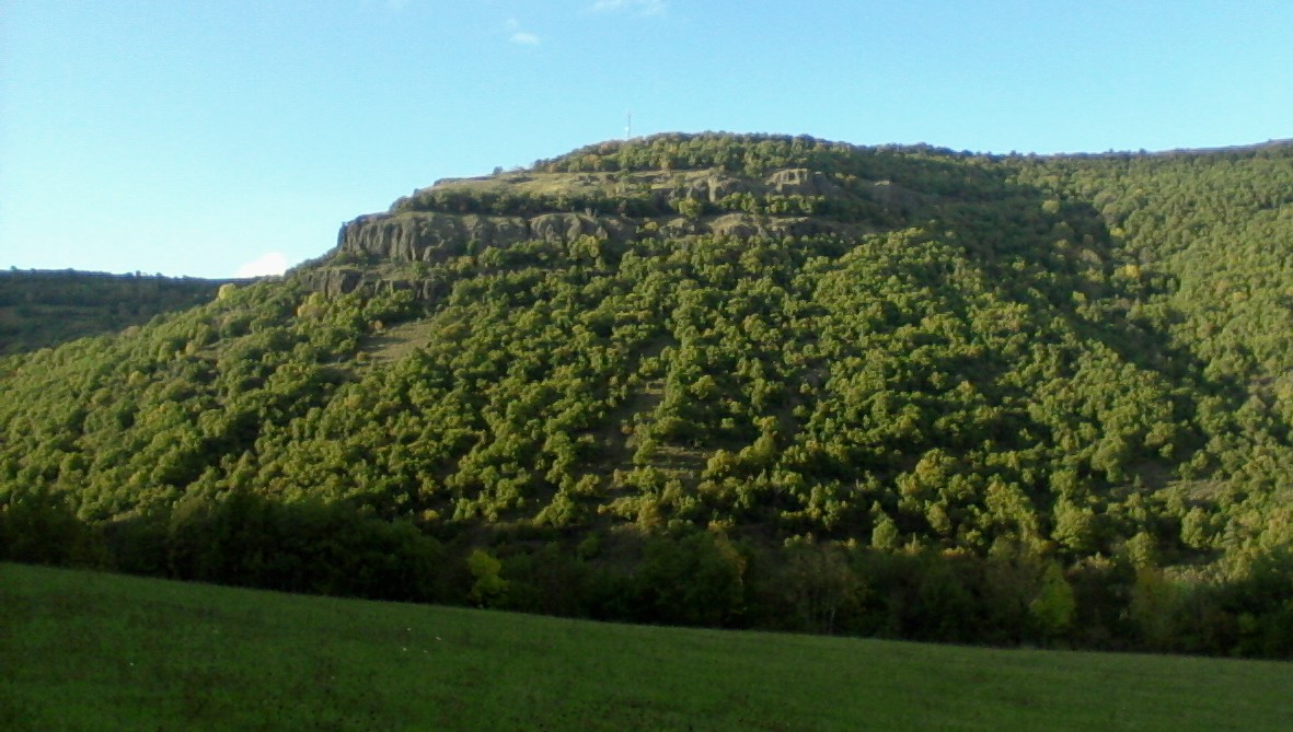 Exemple de relief inversé, Auzelaret Commune de Molompize - France